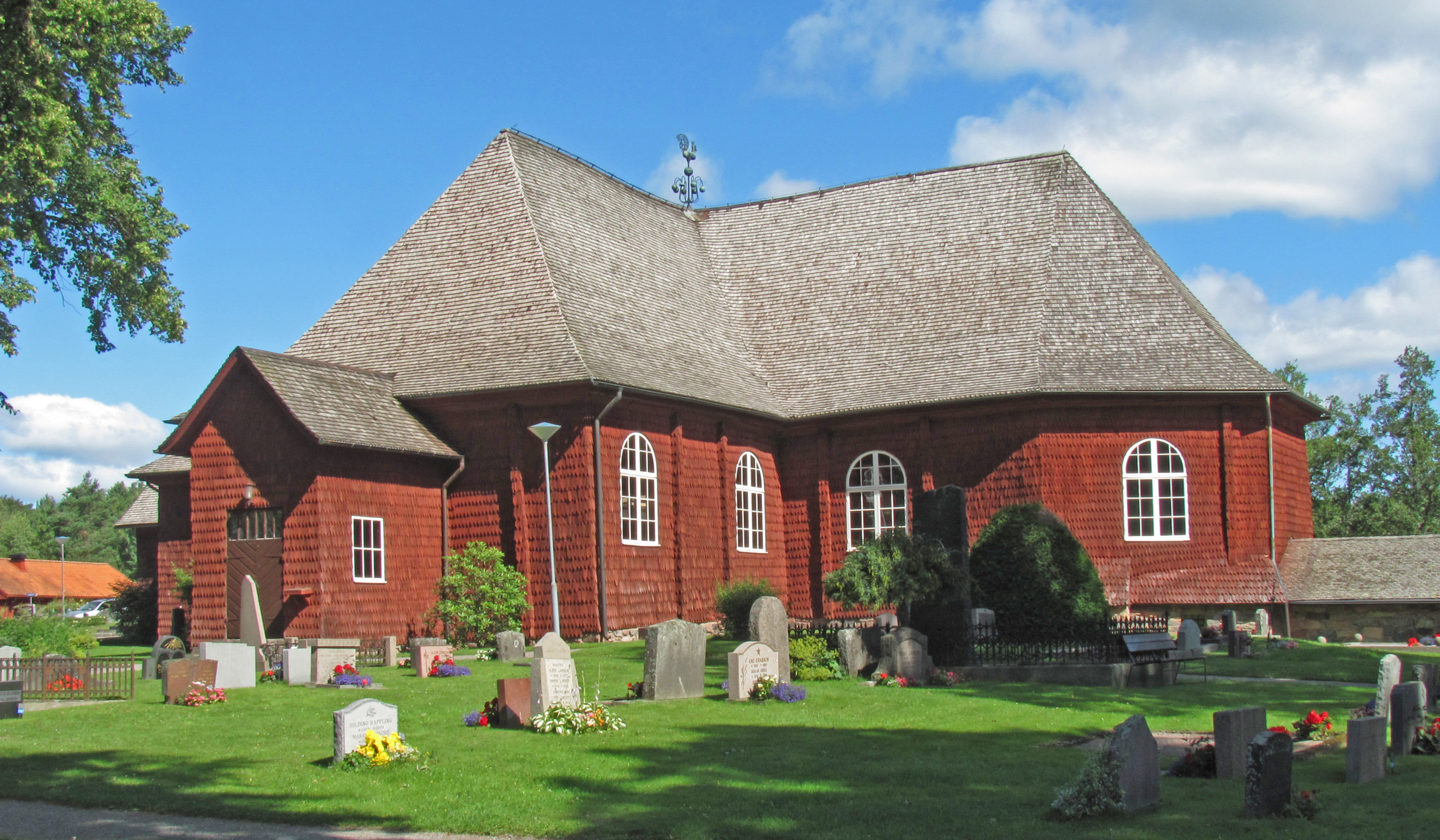 Nyeds kyrka